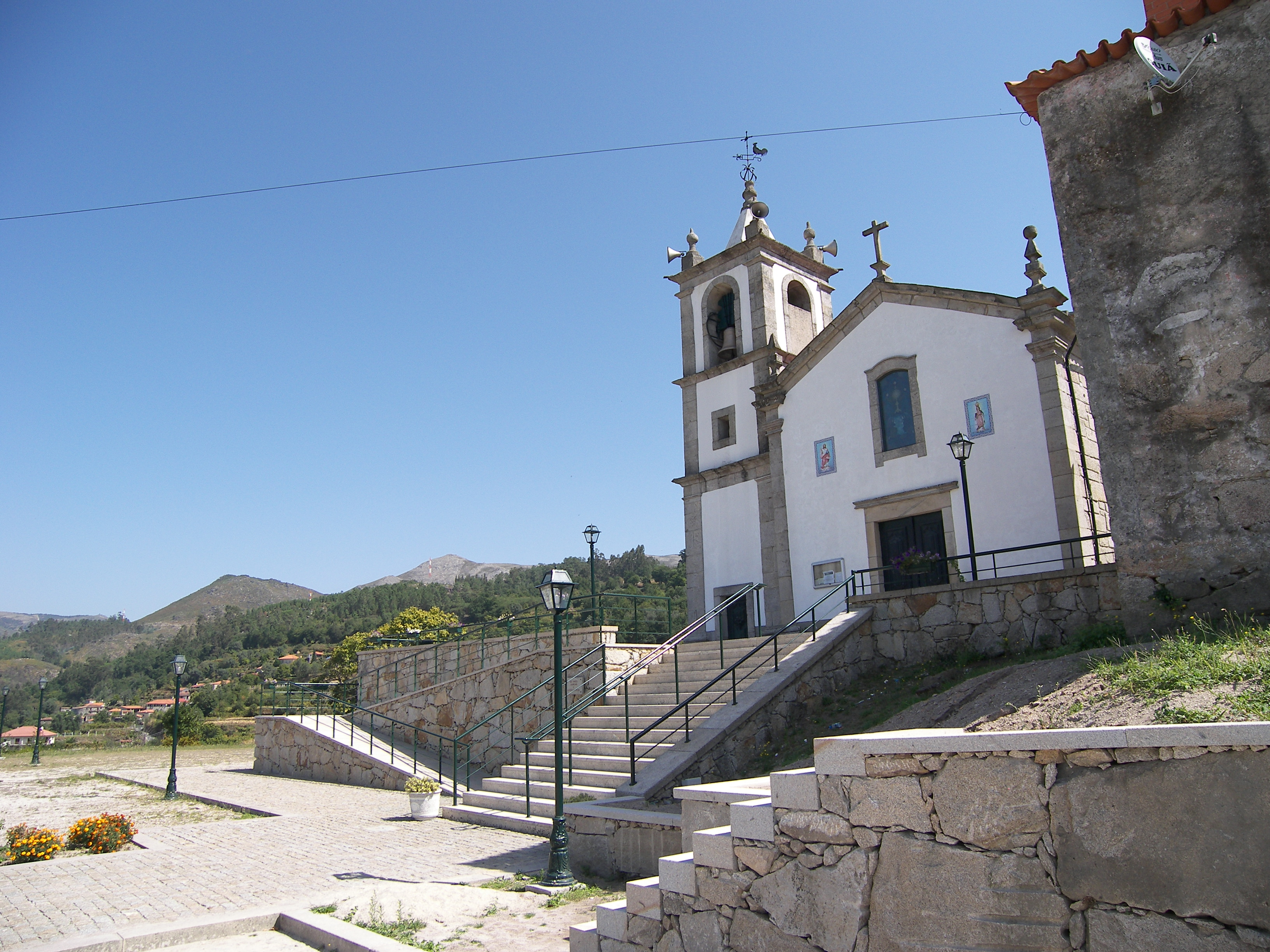 Kirche in Cabreiro